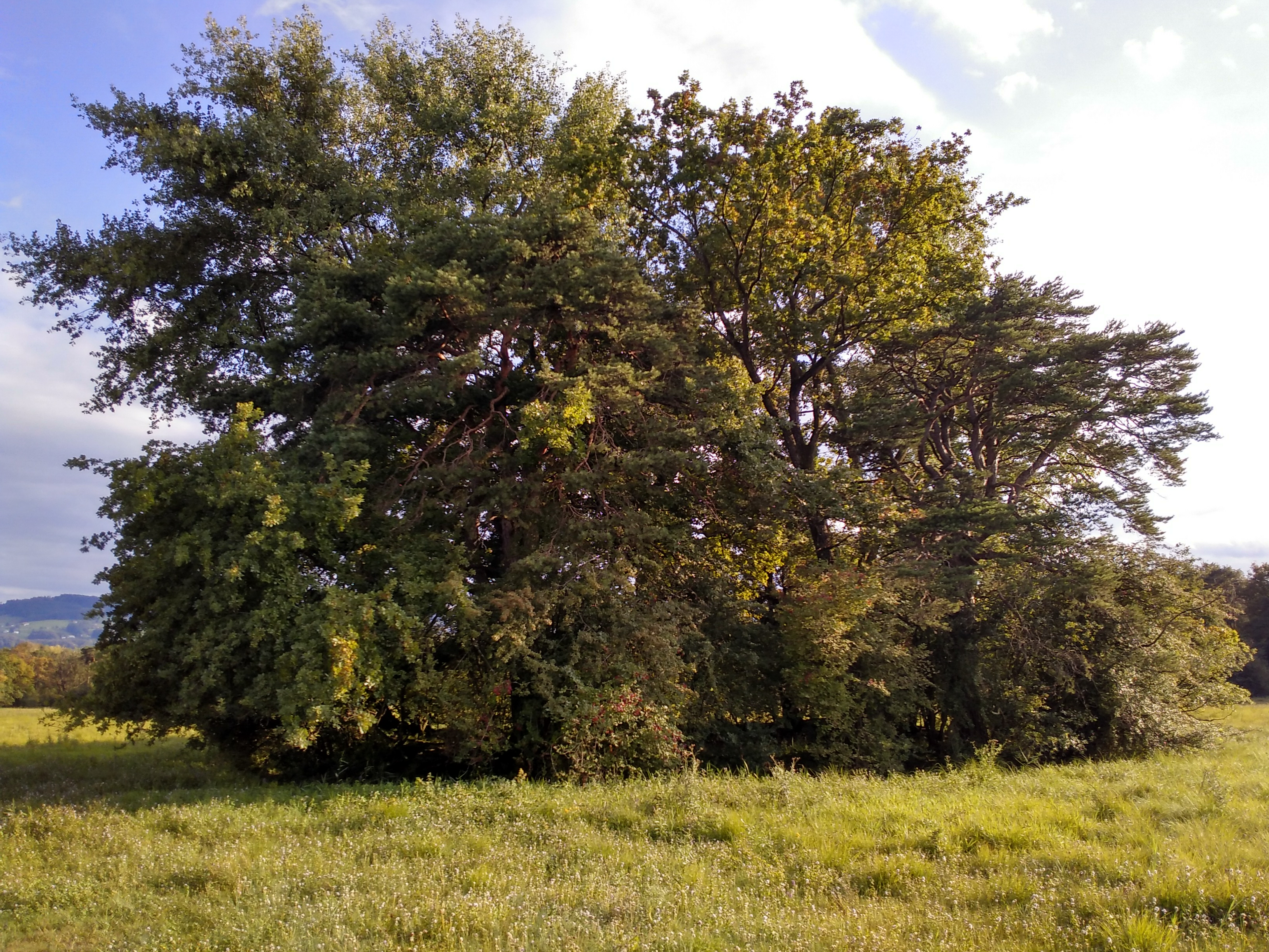 Der heute von Bäumen überwachsene Ringwall-Rest im Gaißauer Rheinholz